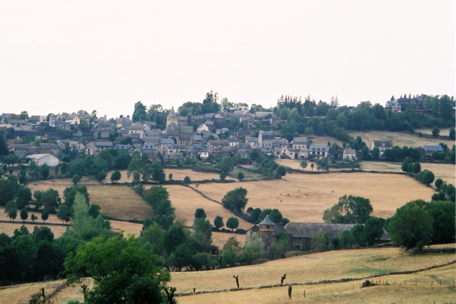 vue de Prades d'Aubrac